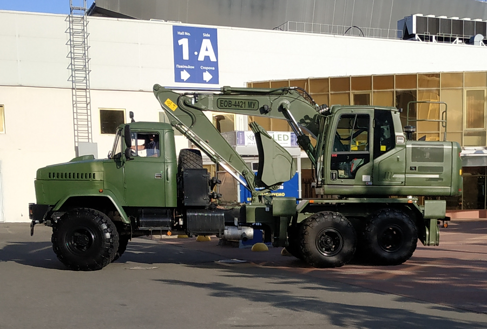 Войсковой экскаватор ЭОВ-4421 МУ на шасси КрАЗ-6322 в экспозиции Дрогобычского завода автокранов. Выставка "Зброя та безпека", Киев, октябрь 2019 г.